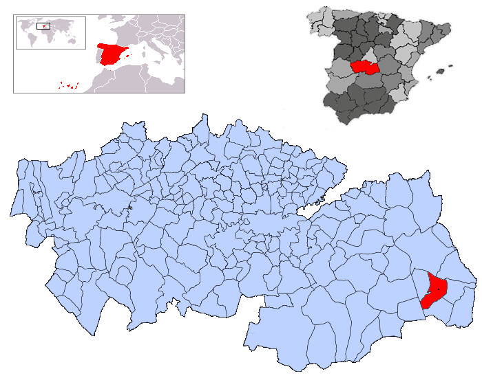 La Puebla en la provincia de Toledo